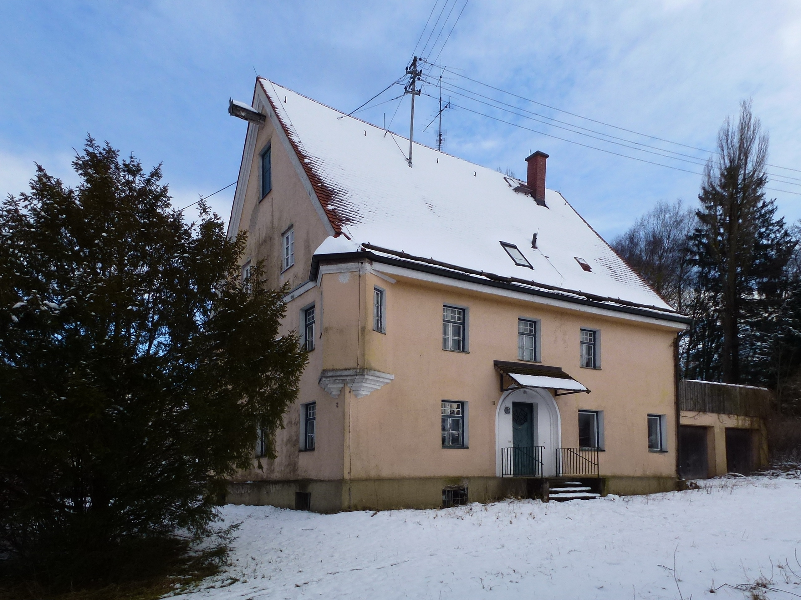 Bergkirchen -OT Kreuzholzhausen Kirchbergstr2. Ehem Pfarrhaus, Nordwest-Seite